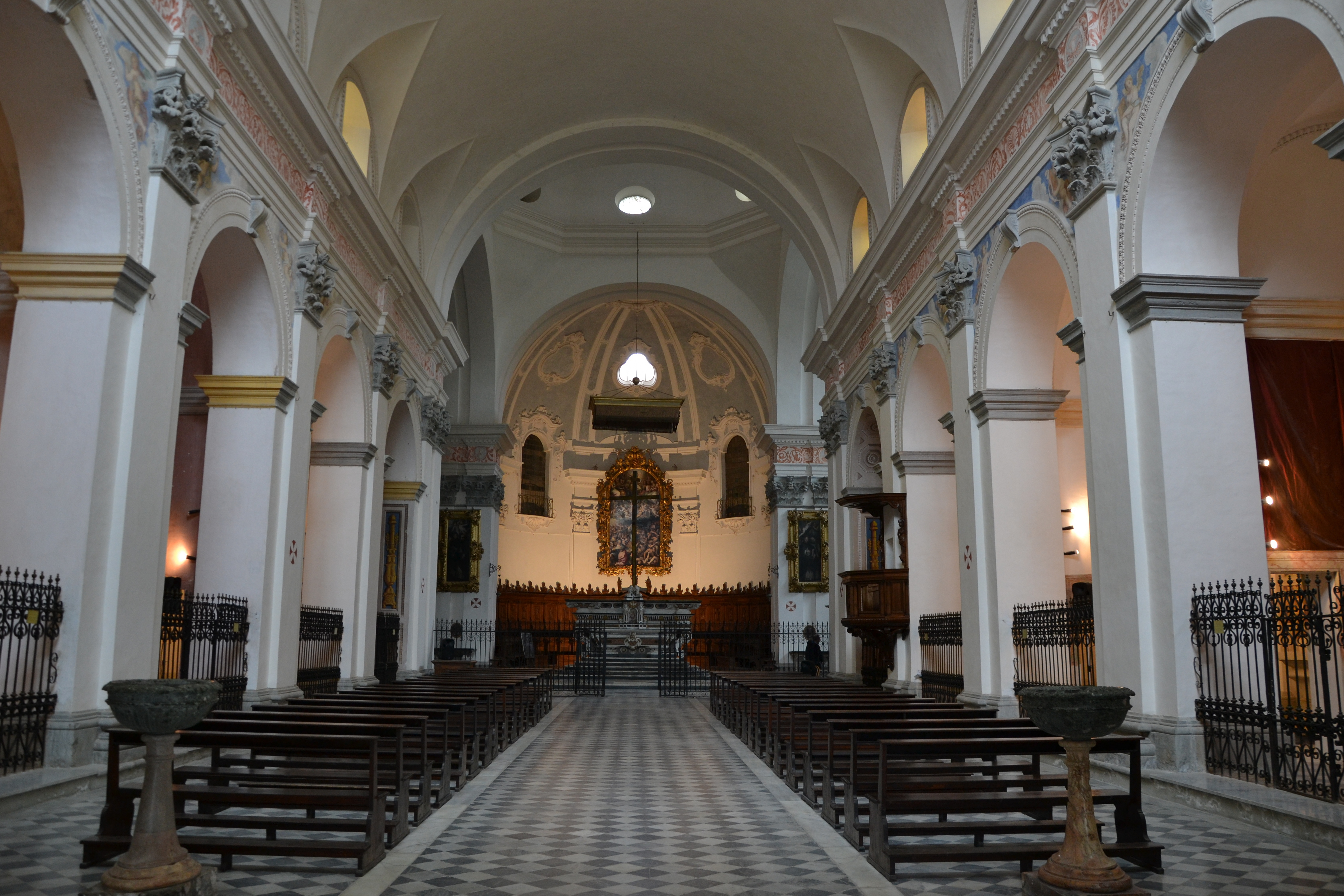 convento domenicano di Santa Croce a Bosco Marengo (AL) realizzato per volontà di papa Pio V nella seconda metà del sec. XVI, nel 1862 divenne riformatorio giovanile fino al 1989.